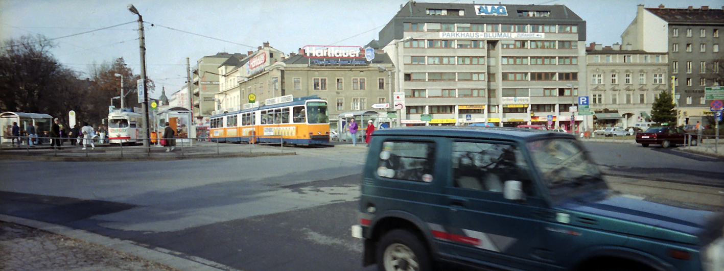 Der Linzer Blumauerplatz im Jahr 1992. Aufnahme mit einer Einwegkamera (Fuji QuickSnap Panorama). Scan von Negativ